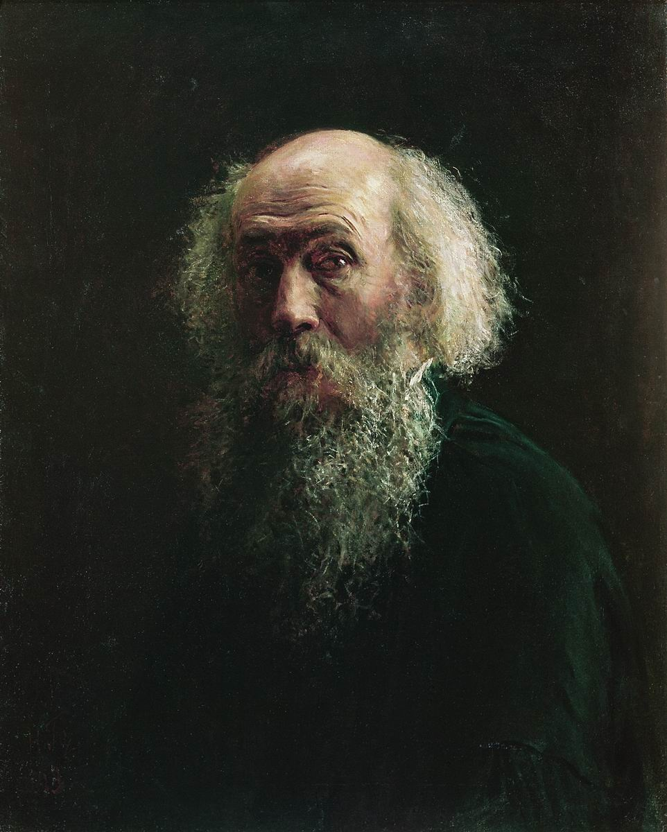 Ге Николай. Автопортрет. 1892 Киевский государственный музей русского искусства